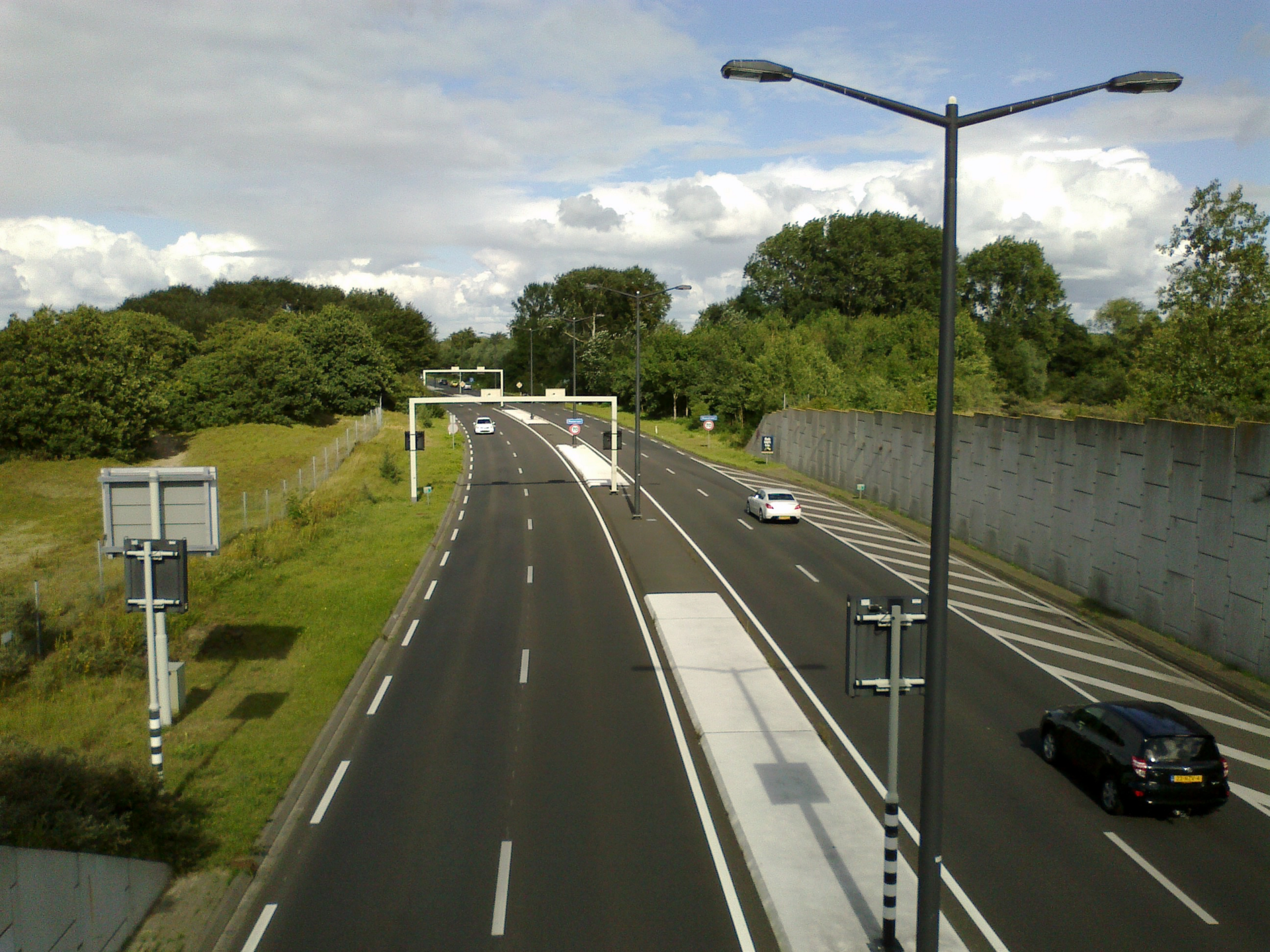 Vlakte van Waalsdorp (National Monument Waalsdorpervlakte), 2016.